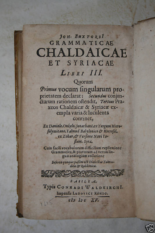 Grammaticae Chaldeicae et Syriacae de Buxtorf